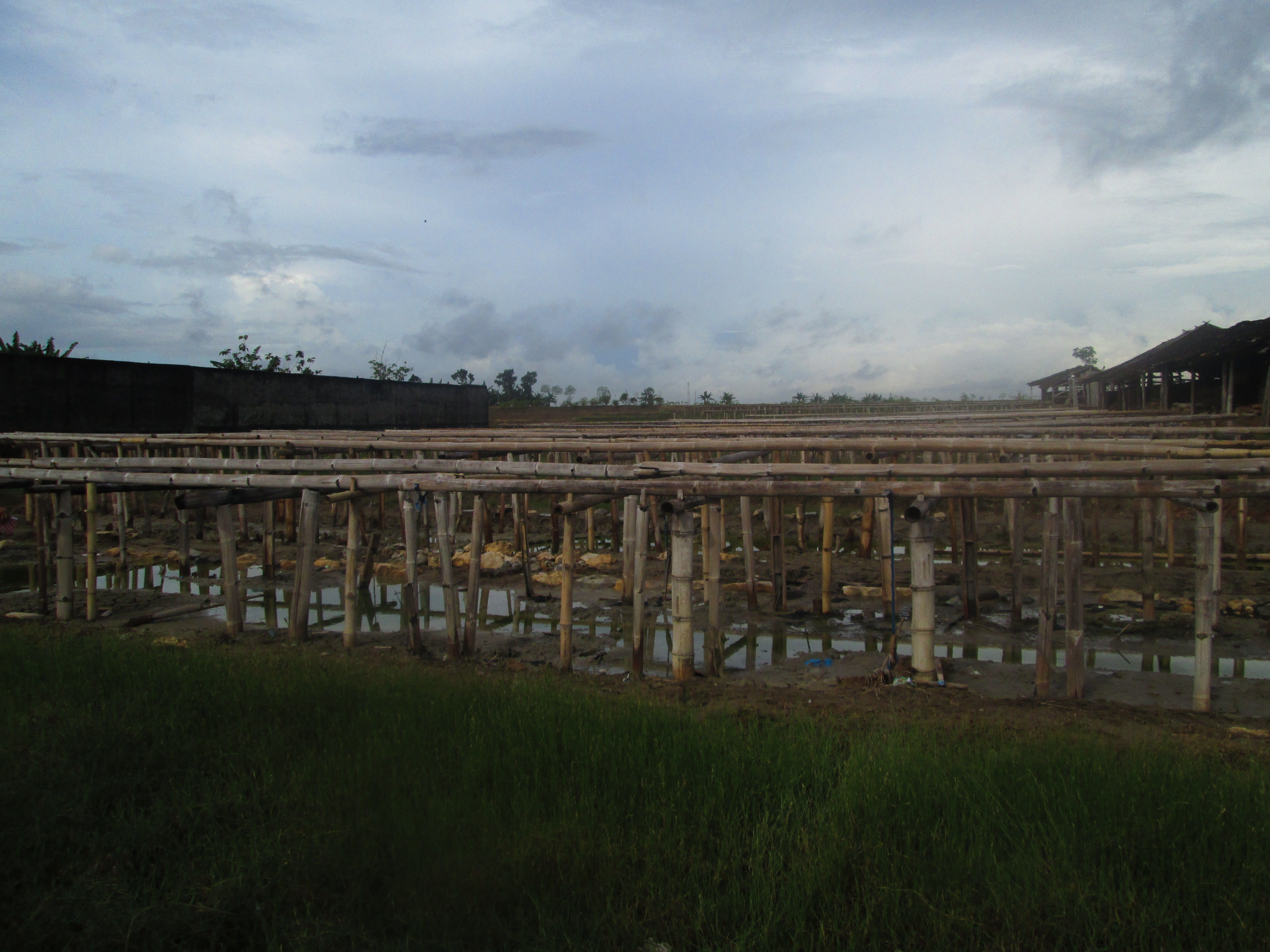 Production de sel dans le village de Jono, Kecamatan Tawangharjo, département de Grobogan, province de Java Central, Indonésie.